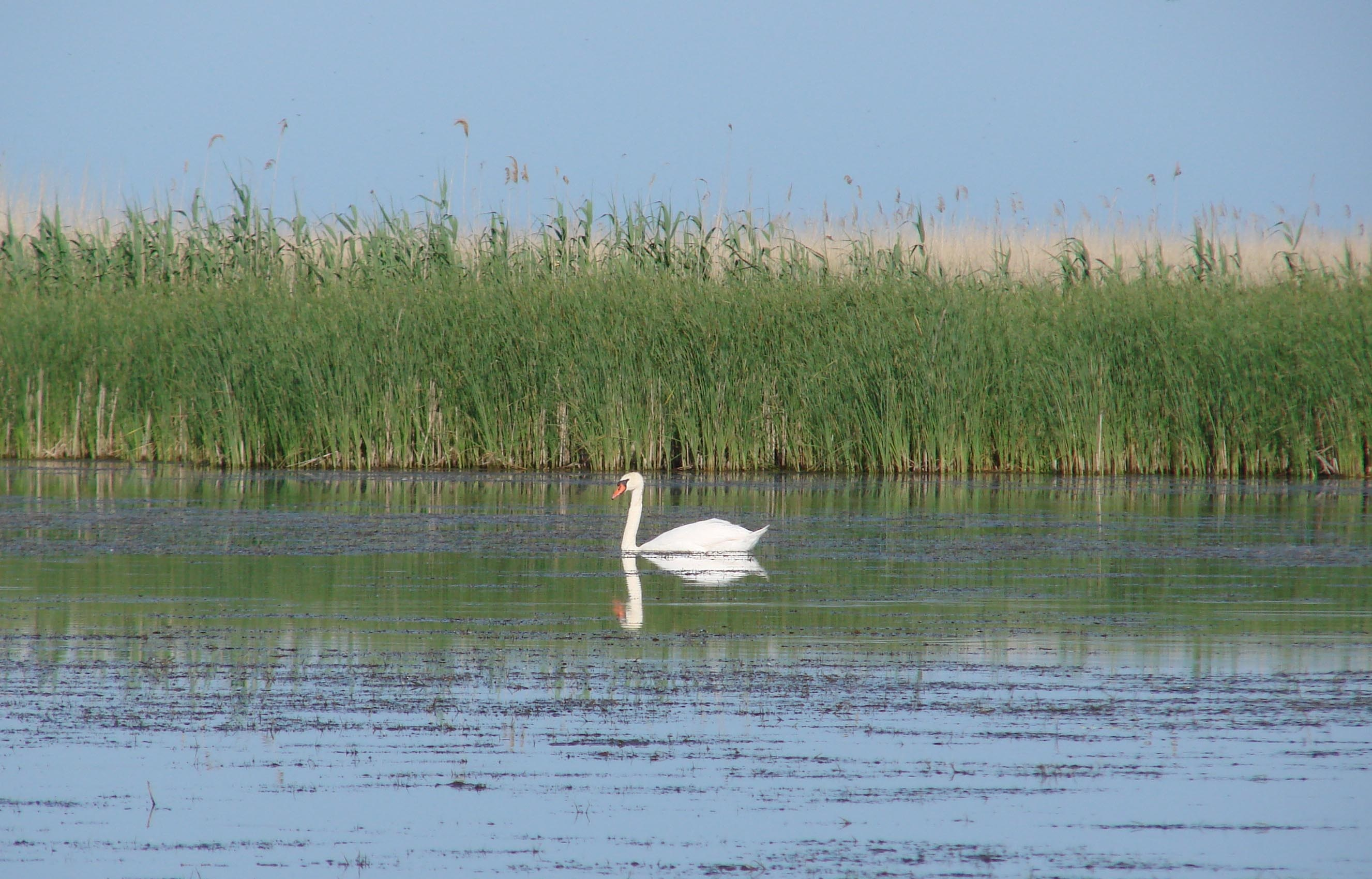 Лебедь в Лимане "Горький"